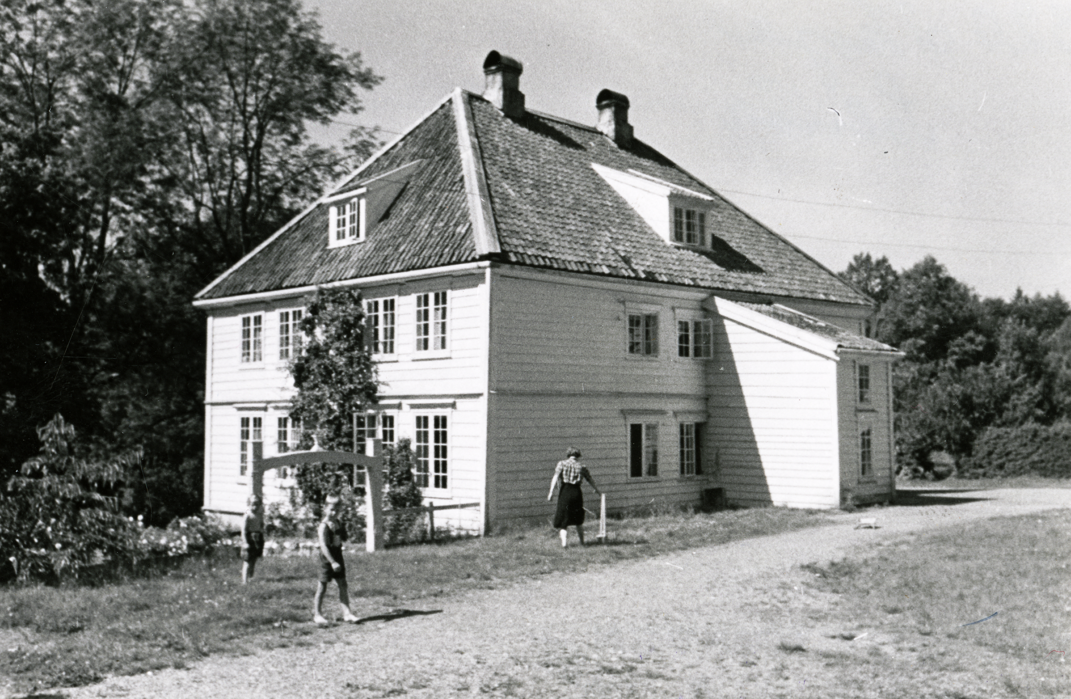 Solnør i Skodje, Møre og Romsdal This image on crowdsourcing geotagging platform Fotodugnad